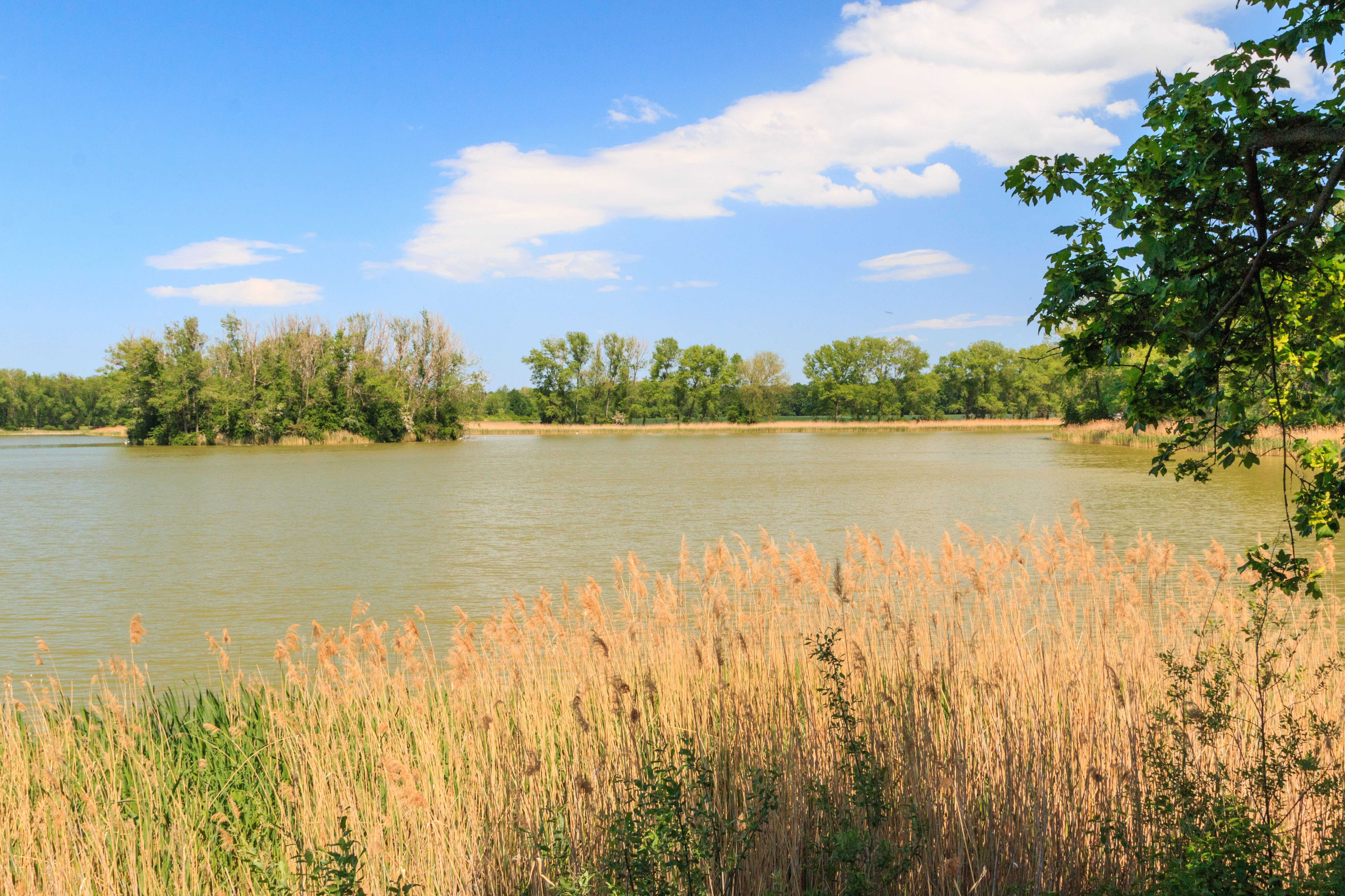 Ředický rybník Project: Vodstvo.